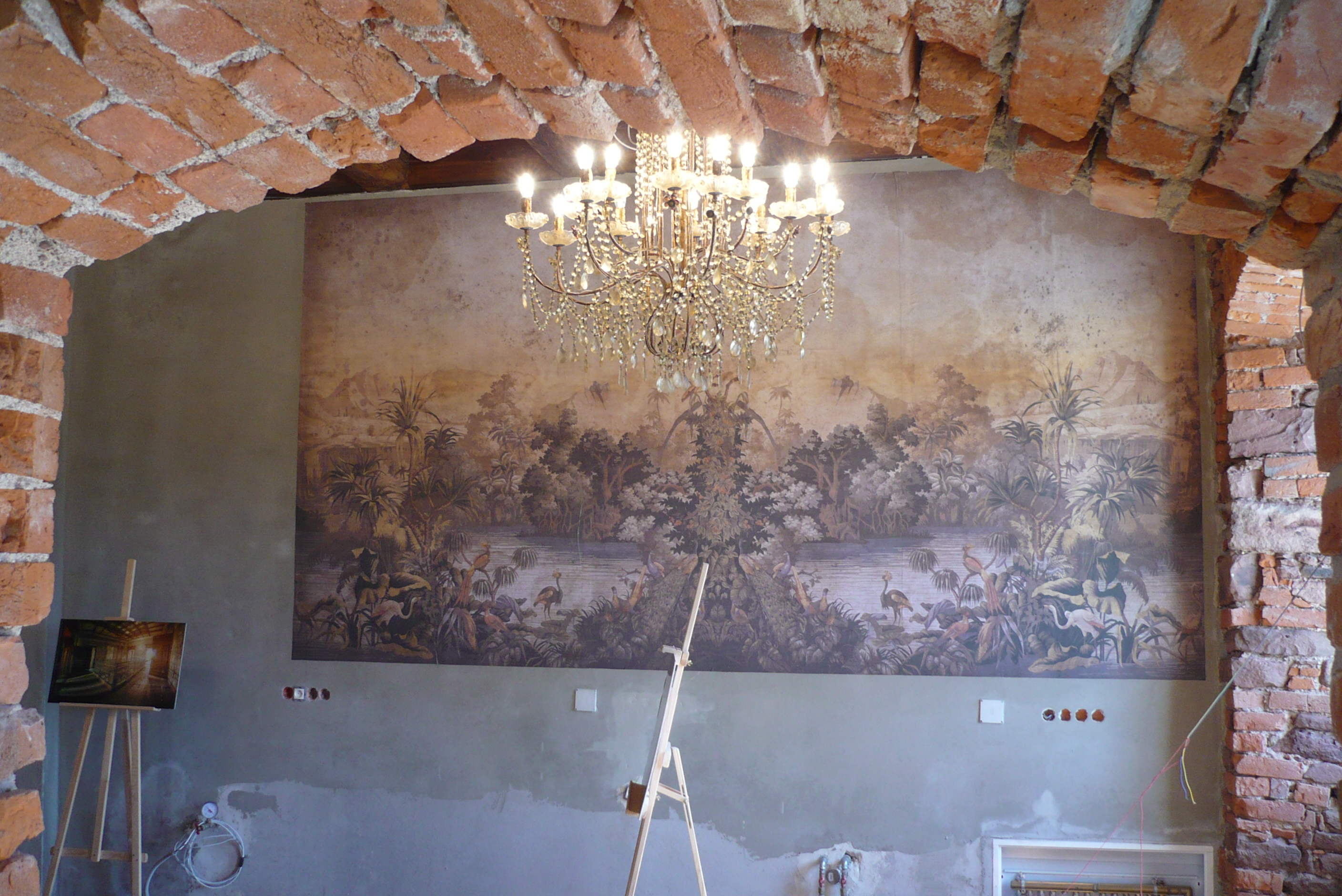 Ścinawka Górna. Sala w budynku bramnym